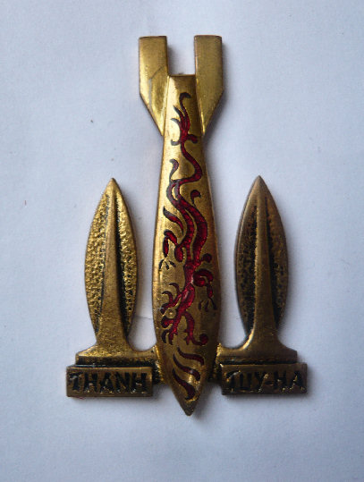 Insigne du Centre Pyrotechnique de THANH TUY HA.